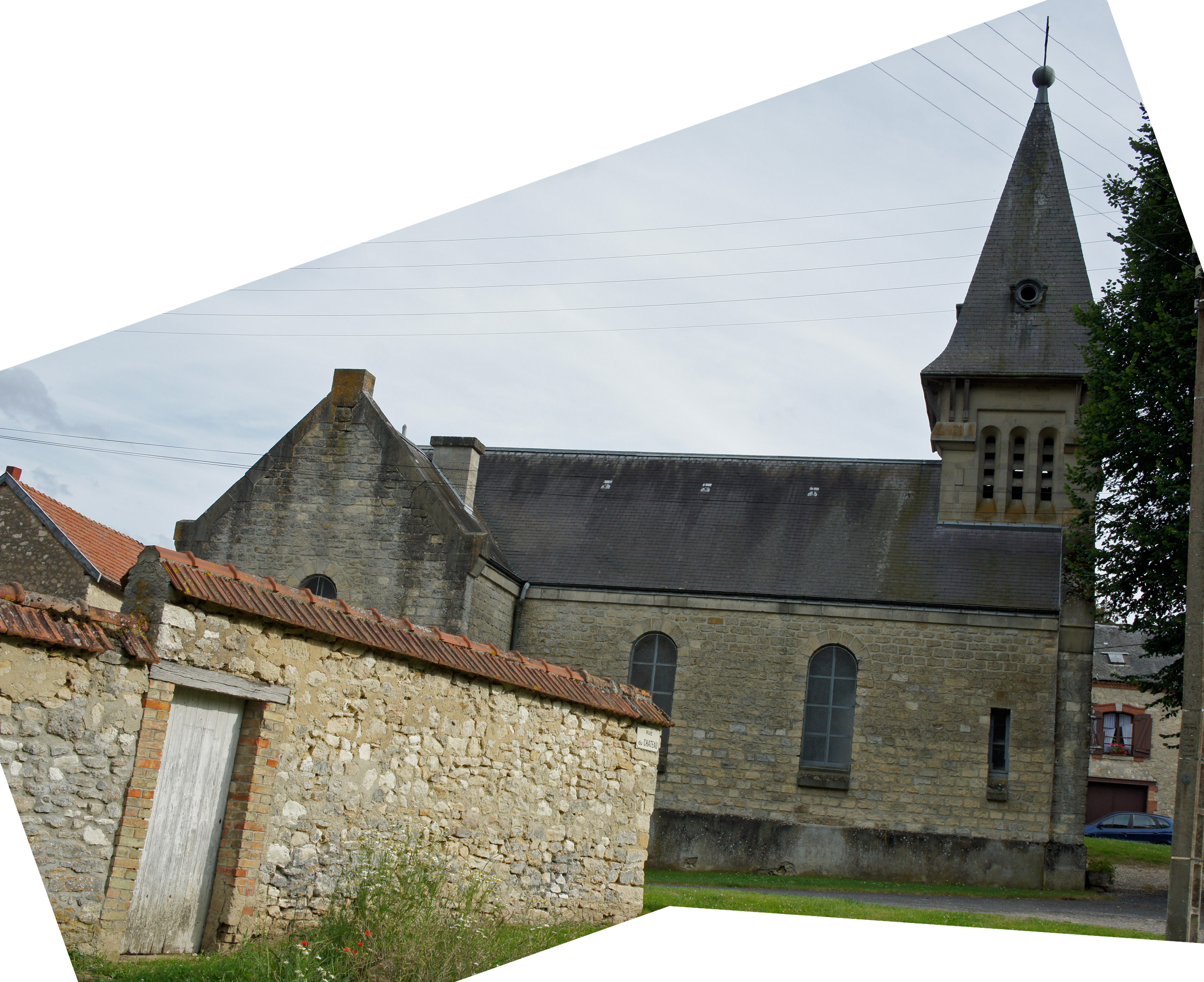 Le village d'Aubilly, vue de son église.